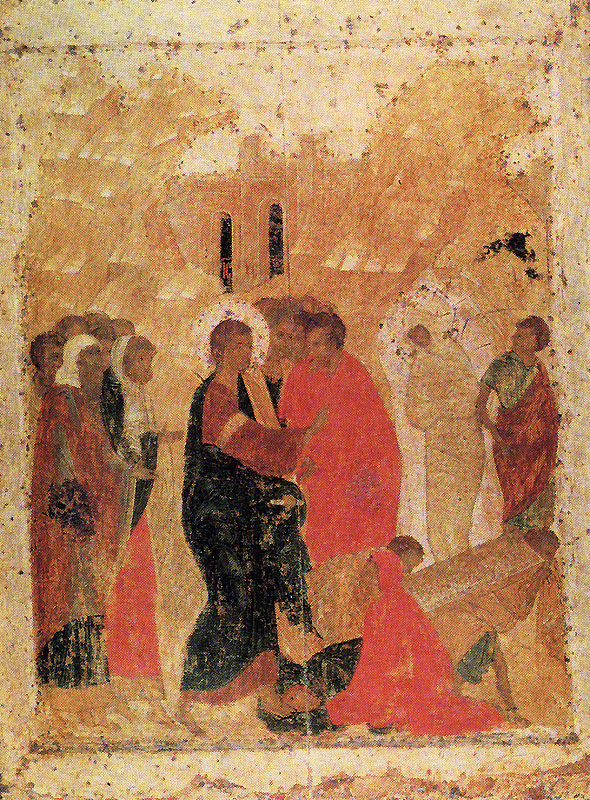 Воскрешение Лазаря Из праздничного чина Школа или худ. центр: Москва Начало XV в. (1410-е гг.?) 80.5 × 61 см Благовещенский cобор Московского Кремля, Москва, Россия Инв. 3246 соб/Ж-1399 Из праздничного яруса иконостаса собора. Приписывая икону кисти Андрея Рублева, В. Г. Брюсова отмечала в рублевском переосмыслении канонической композиции две особенности. Во-первых, Лазарь показан не на фоне черной пещеры, а в сконцентированном освещении, в свете славы Христа. Вторая особенность - перестановка двух групп: иудеев и сопровождающих Христа апостолов. (см. подробнее у [Брюсова 1998, стр. 26, 28]).